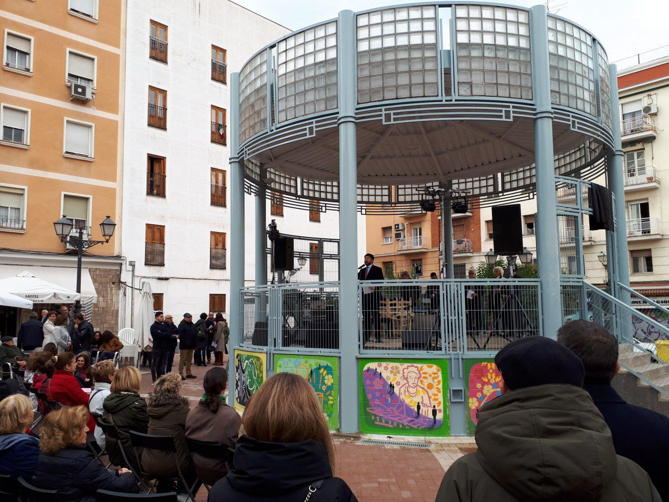 José Menese ha vuelto a su barrio, Puerta del Ángel. Dos años después del fallecimiento del cantaor, se cumple su sueño: dar nombre a un templete donde siempre quiso que se escuchara música. Y como él deseaba, más de dos centenares de familiares, amigos y vecinos del artista se reunieron el sábado en la Plaza de Huarte de San Juan para escuchar los cantes flamencos y las notas de un violonchelo bajo la placa que ya lleva el nombre de José Menese.